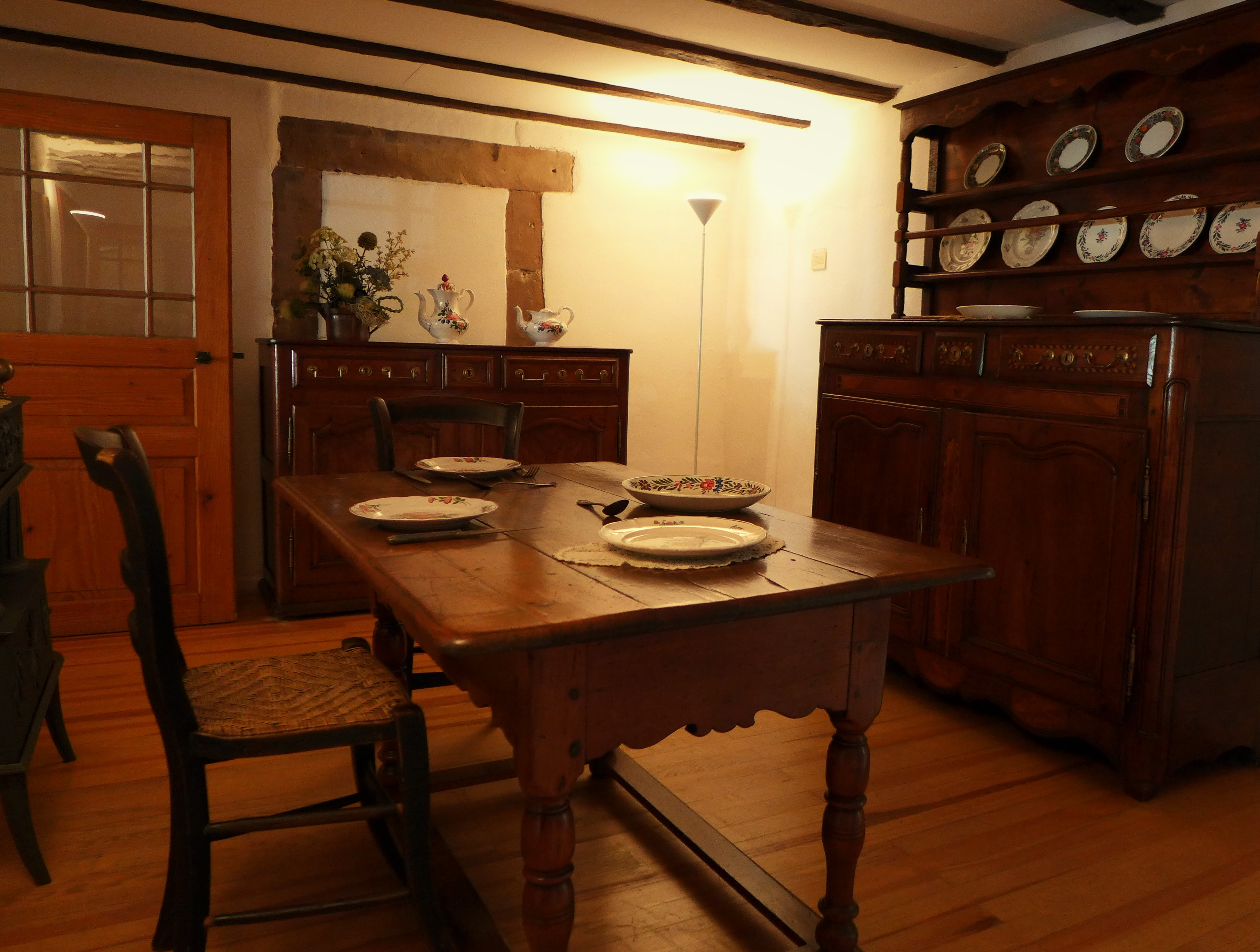 Typisches saarländisches Speisezimmer des 19. Jahrhunderts mit lothringischem Geschirrschrank, Geschirr aus saarländisch-lothringischer Herstellung, Haus Saargau, Gisingen